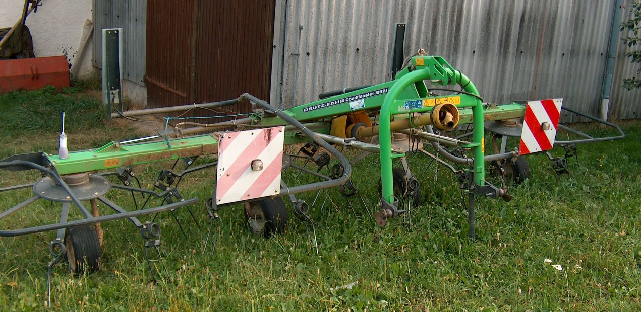 Heuwender, Kreiselheuer CondiMaster 5521 von Deutz-Fahr, Arbeitsbreite 5,50 m